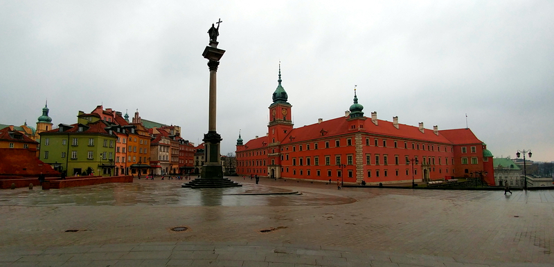 Warszawa, Zamek Królewski w Warszawie